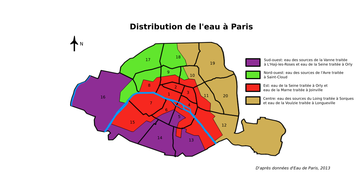 Distribution de l'eau à Paris d'après les données d'Eau de Paris.